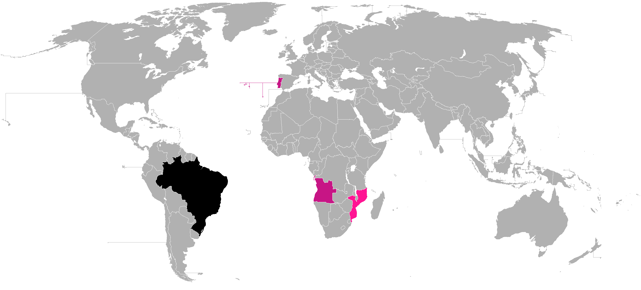 Más de 100 millones Más de 50 millones Más de 20 millones Más de 10 millones Más de 5 millones Más de 1 millón